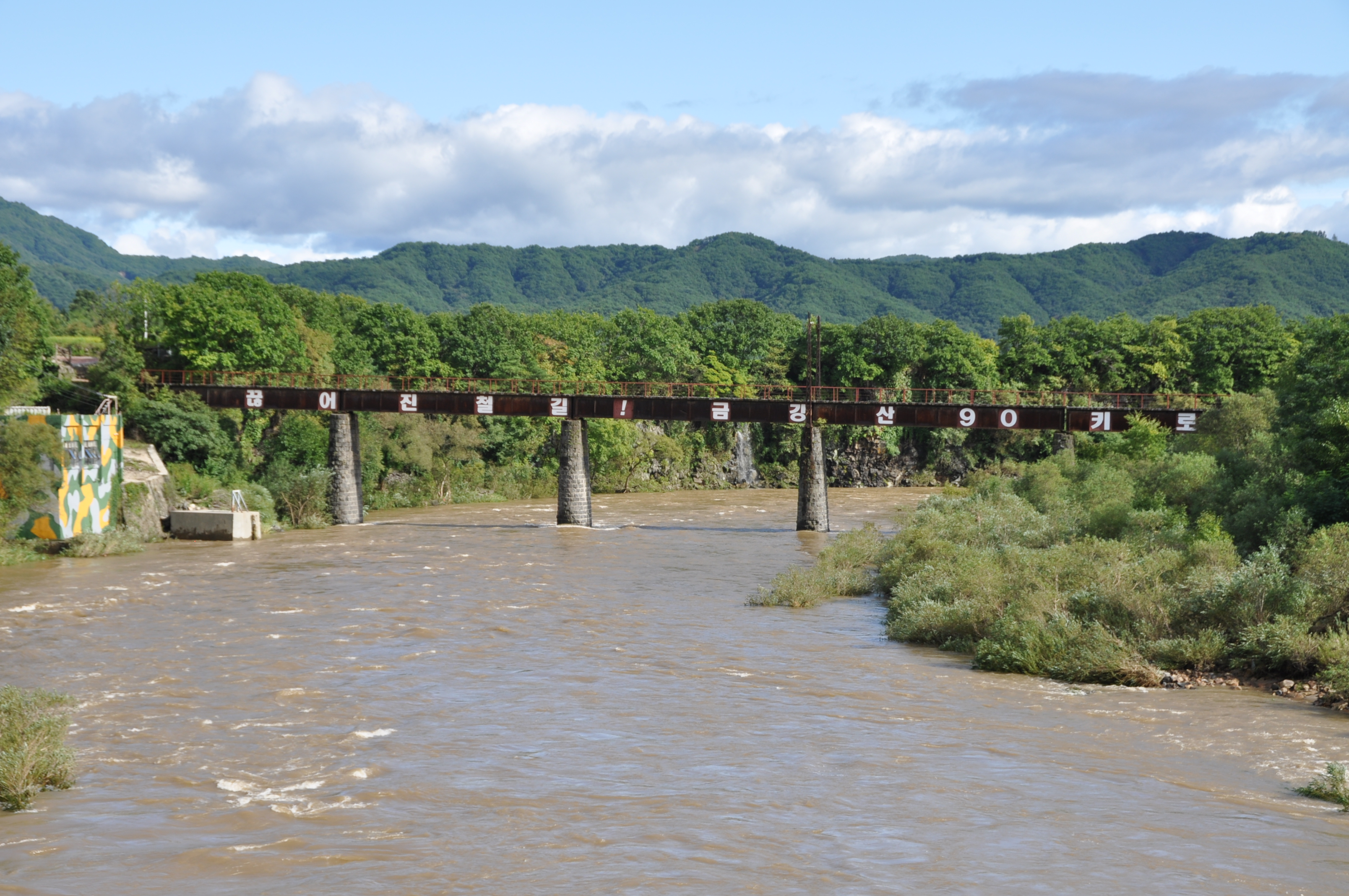 금강산철교 중 일부였던 교량